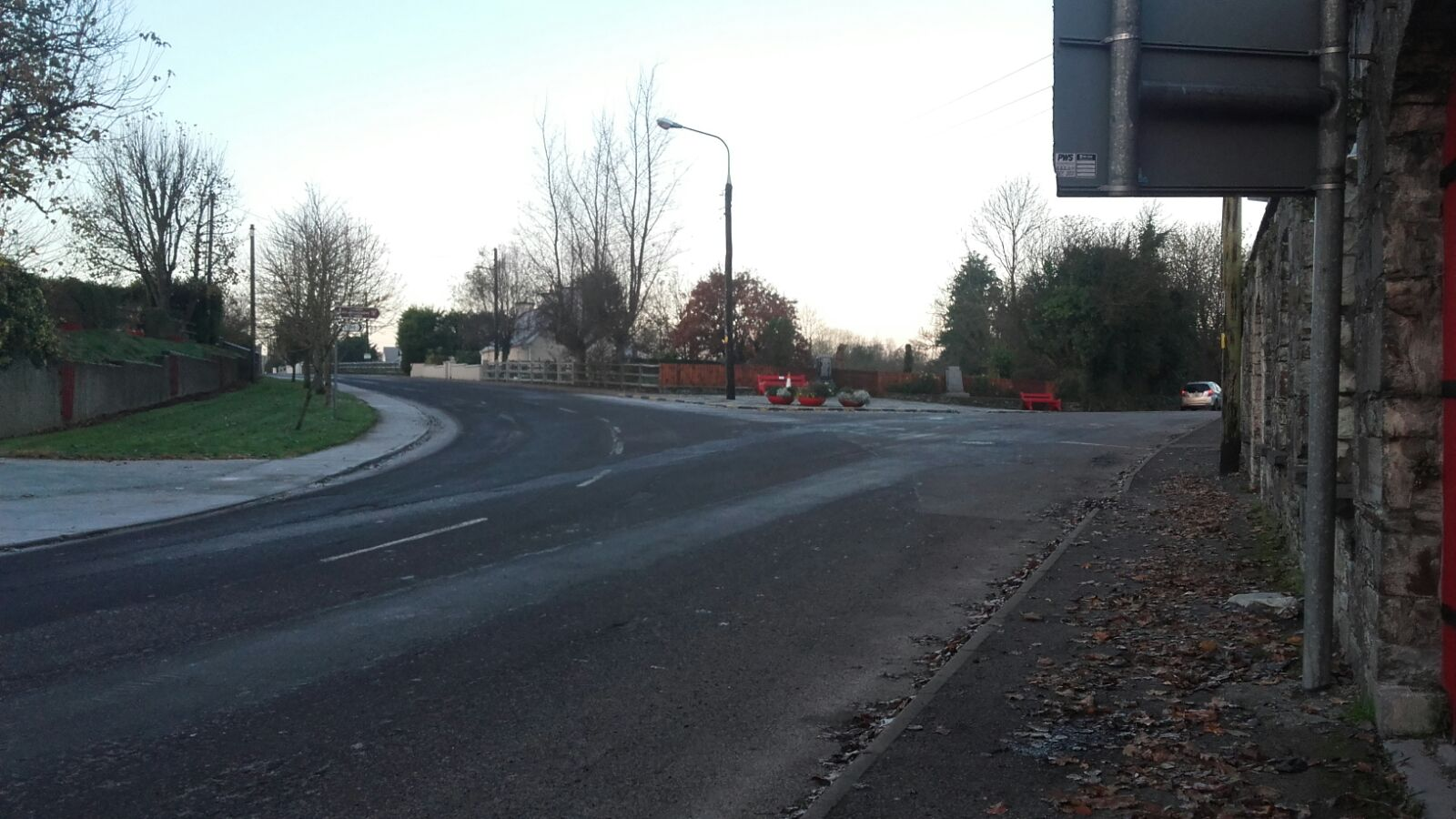 Tairbeart, Contae Chiarraí